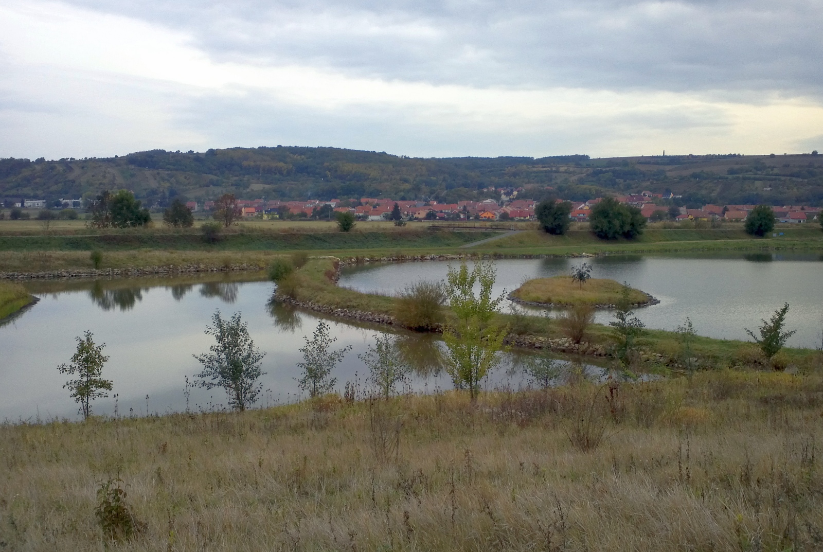 Rybník Blučiňák, v pozadí obec Blučina a vrch Výhon.